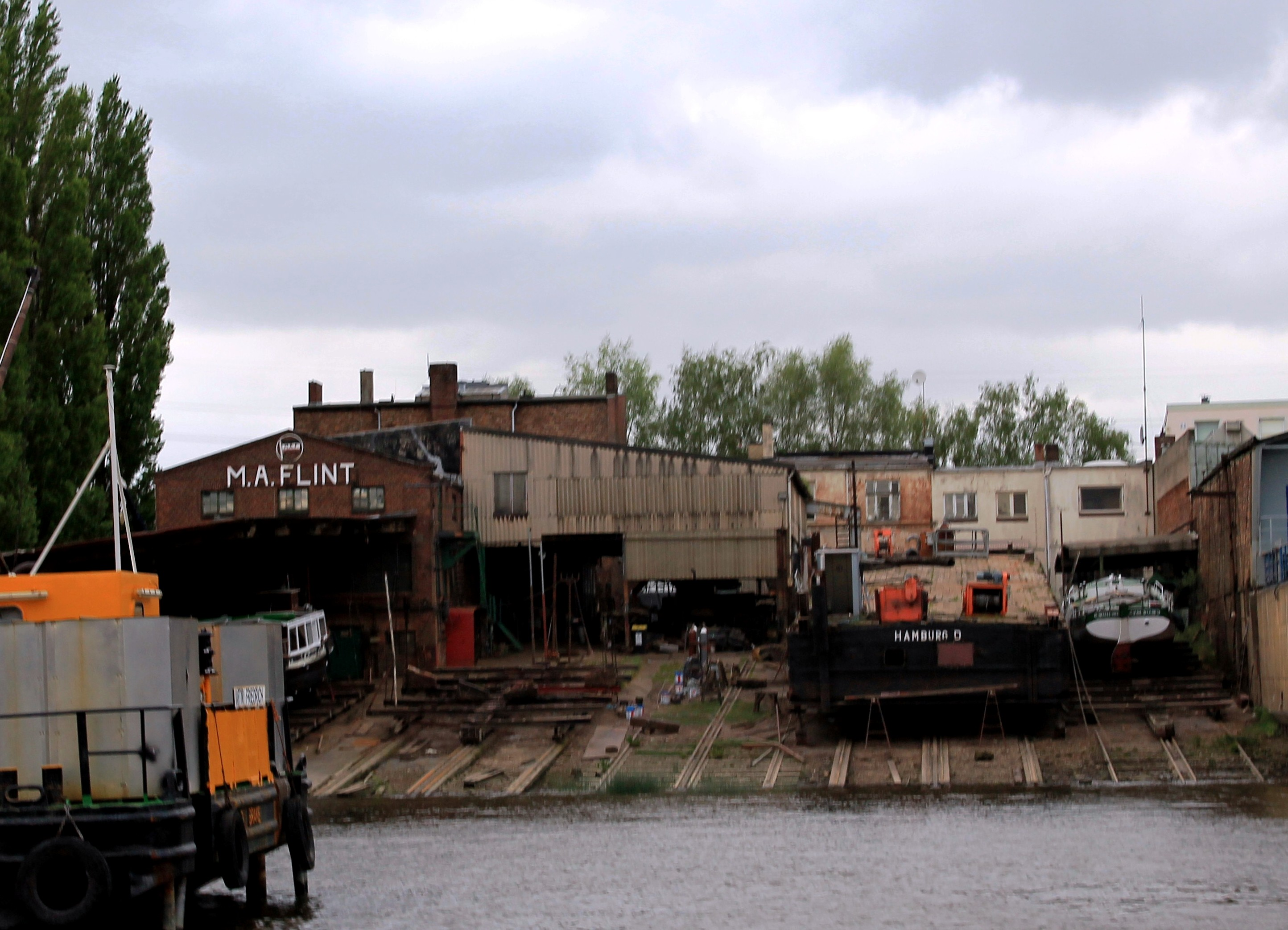 Blick auf die Werft M. A. Flint